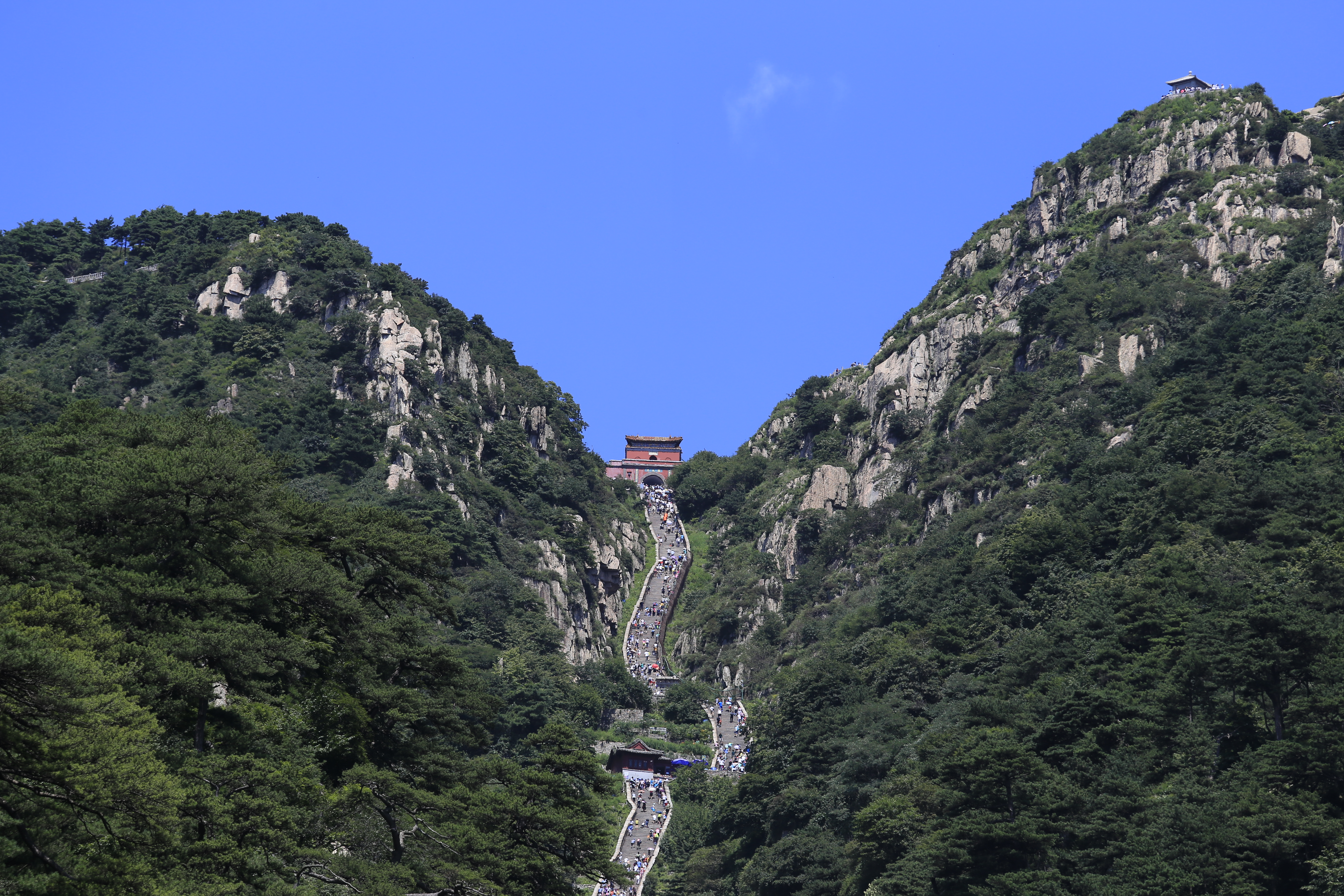 泰山 十八盘